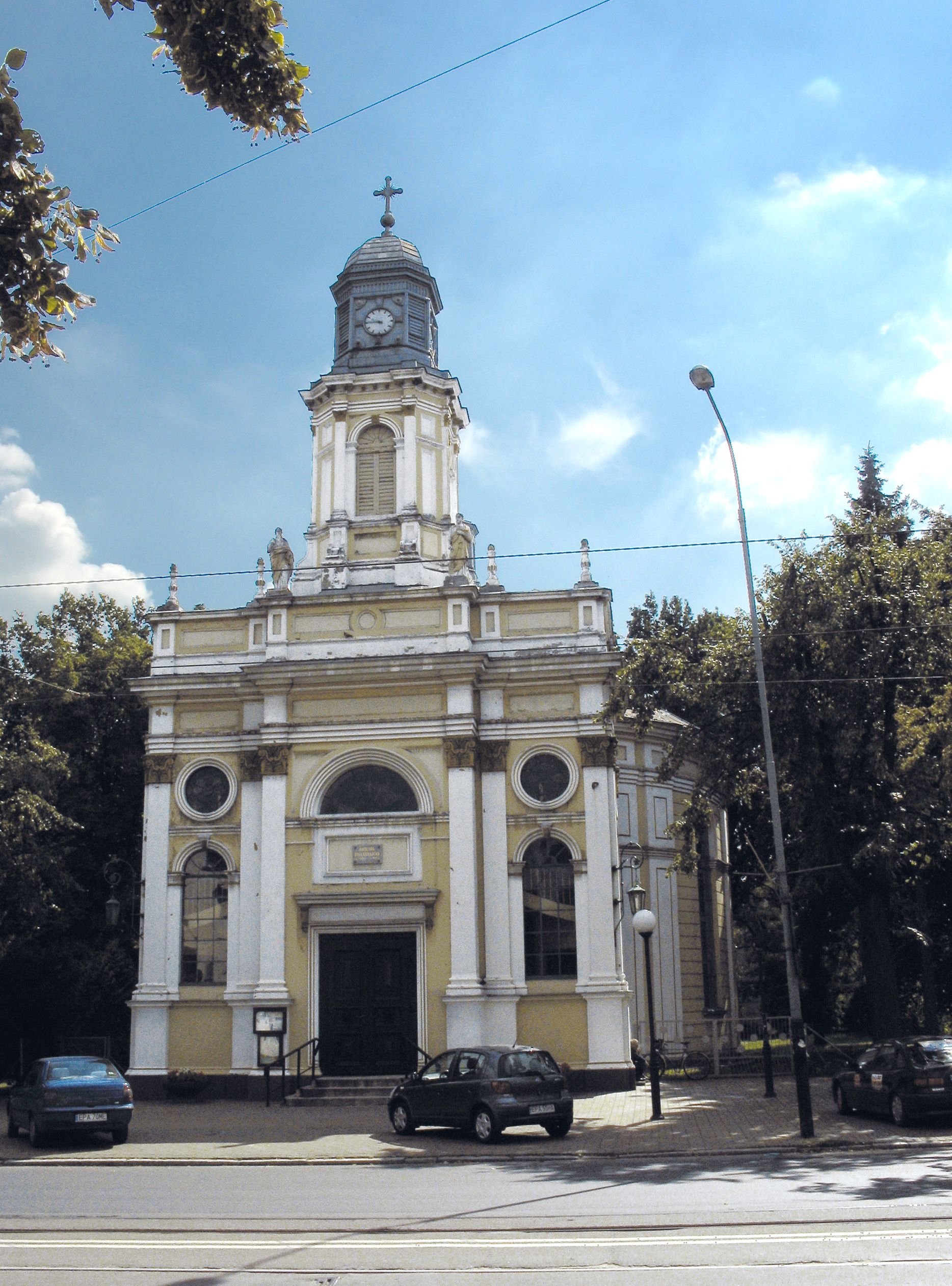 Pabianice - kościół ewangelicki św. Piotra i Pawła (zabytek nr rejestr. A/45)